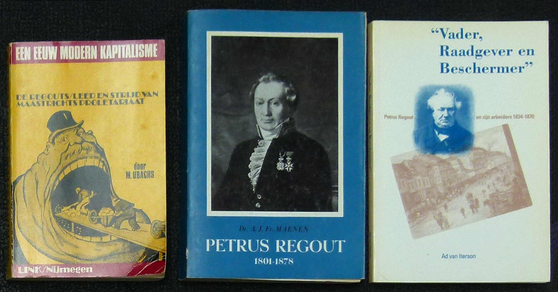 Drie biografieën van de Maastrichtse entrepreneur Petrus Laurentius Regout (1801-1878). Van links naar rechts: M. Ubachs (1934): Een eeuw modern kapitalisme. De Regouts. Leed en strijd van Maastricht's proletariaat; A.J.F. Maenen (1959): Petrus Regout 1801-1878. Een bijdrage tot de sociaal-economische geschiedenis van Maastricht; A. van Iterson (1992): "Vader, Raadgever en Beschermer". Petrus Regout en zijn arbeiders 1834-1870.